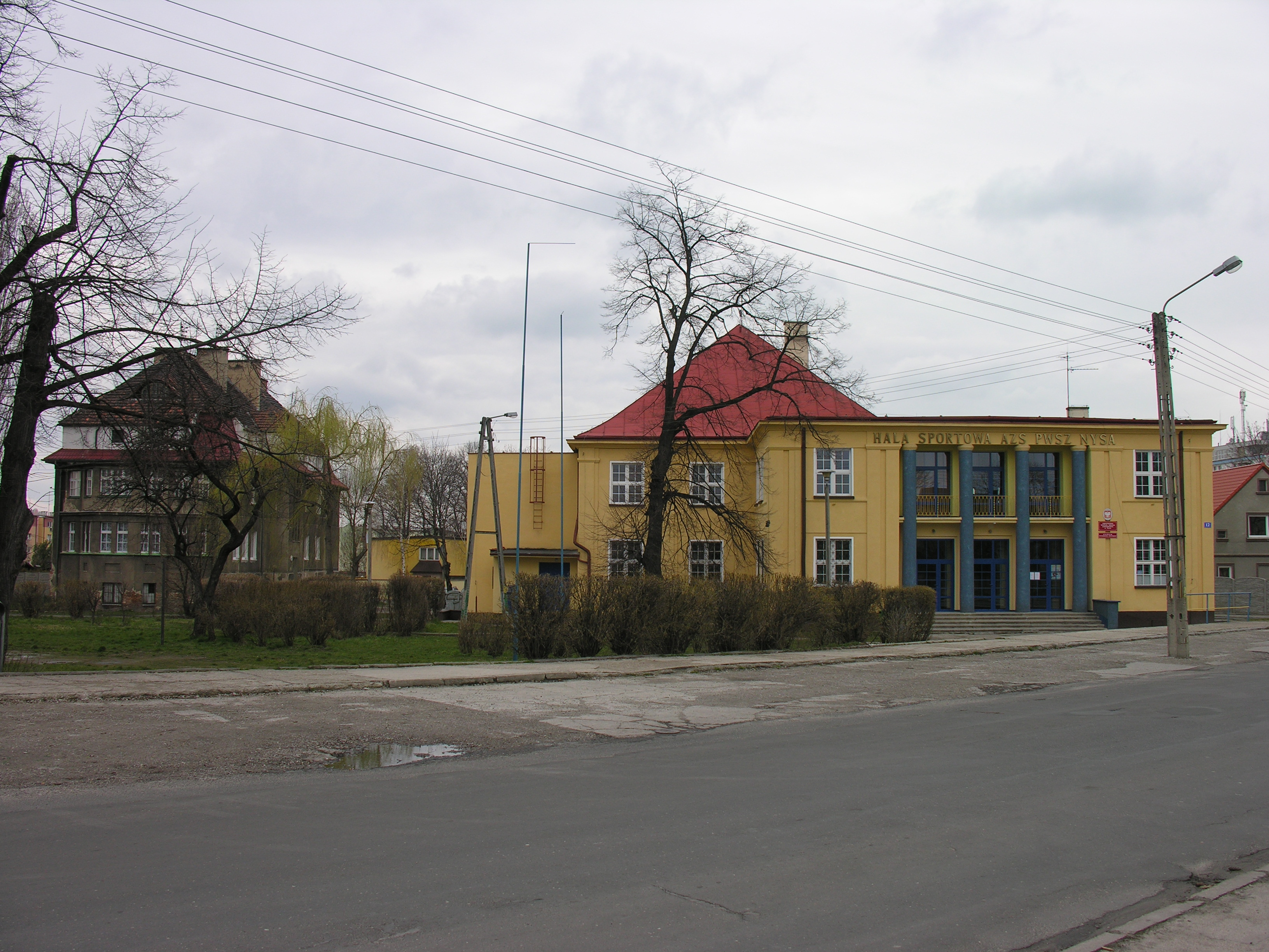 Nysa - dawny dom katolicki "Heimgarten", obecnie hala sportowa PWSZ